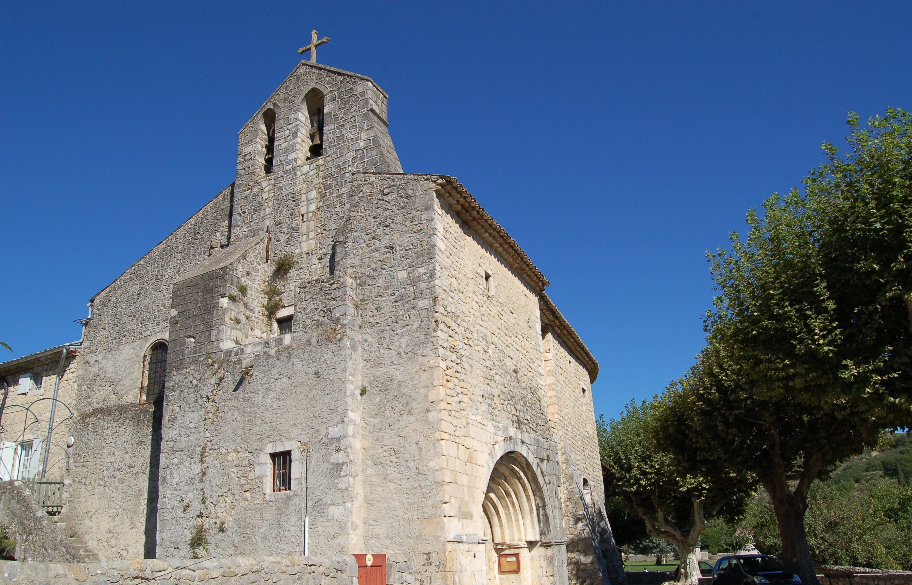 Eglise de St Maurice d'Ibie